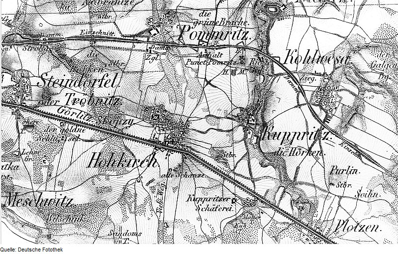 Original image description from the Deutsche Fotothek Hochkirch-Kuppritz. Oberreit, Sect. Bautzen, 1844/46